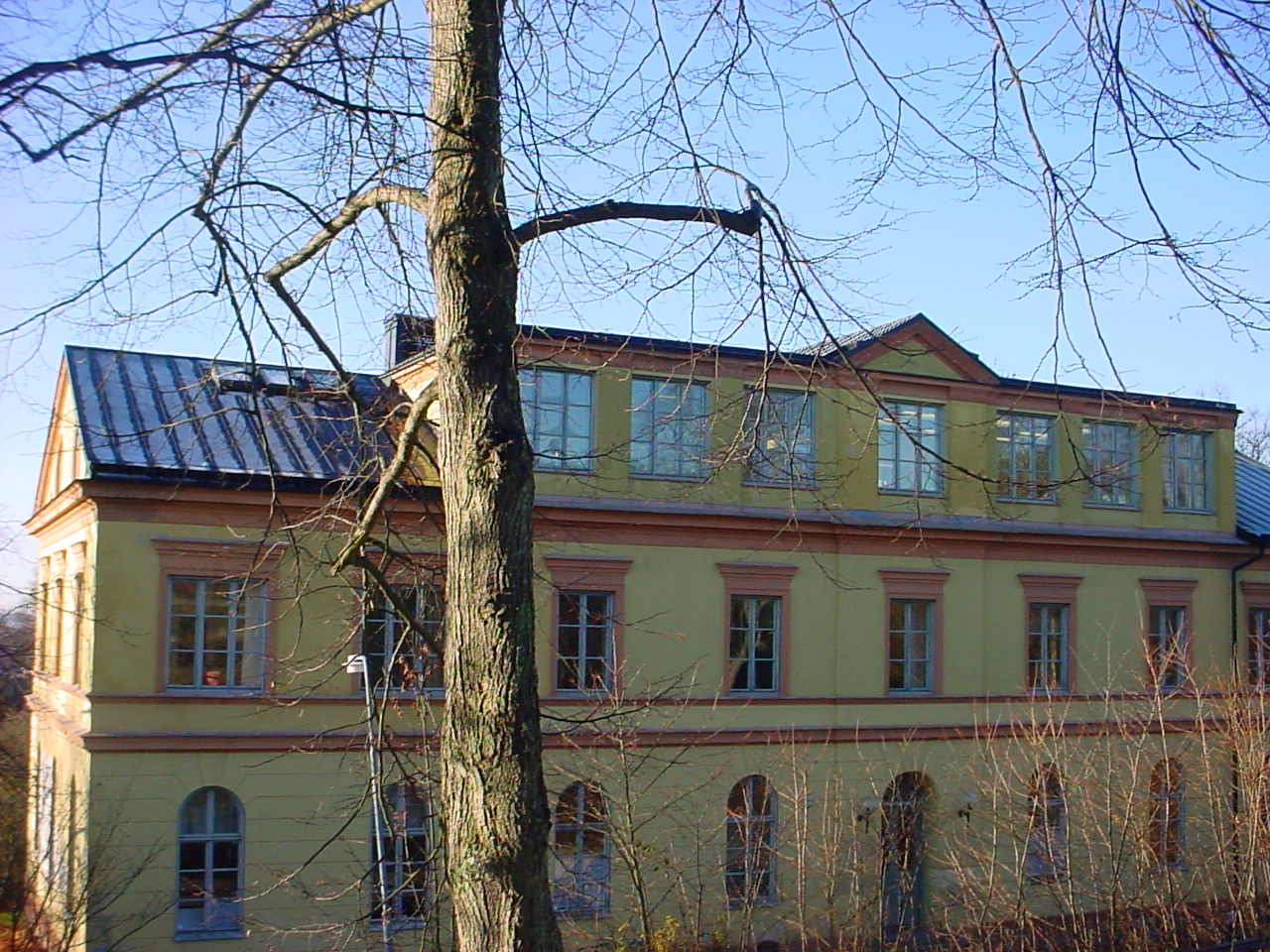 Enköping, Elementärläroverket uppfört 1864. Numera kommunal musik- och dansskola.